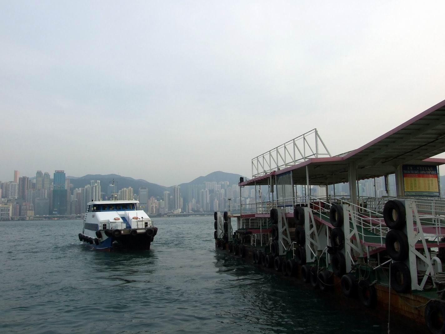 尖東碼頭